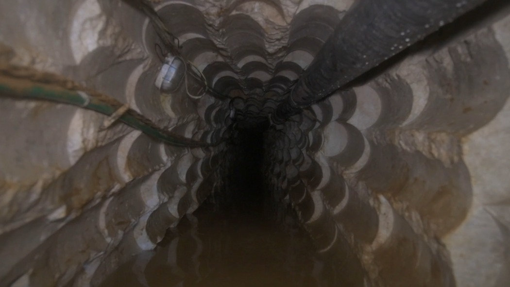 סיור במנהרת הדגל של חיזבאללה. נטרולה של מנהרת הדגל "רמיה", השישית והאחרונה. המנהרה שמגיעה לעומק 80 מטרים, שזהה לכ-22 קומות, ופתחה נמצא כ-77 מטרים לתוך גבול ישראל.